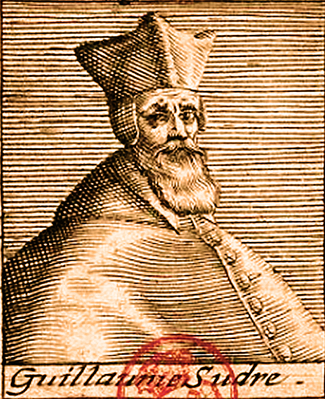 Cardinal Guillaume Sudre